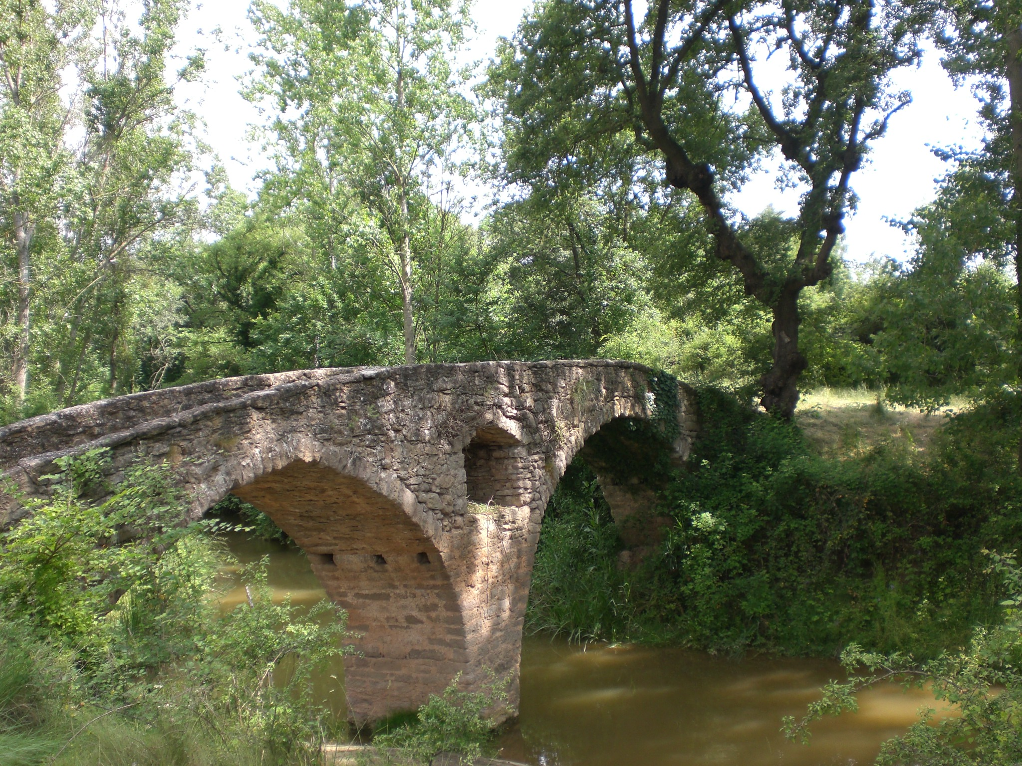 Pont romànic de Sant Martí d'Albars (juny 2011)